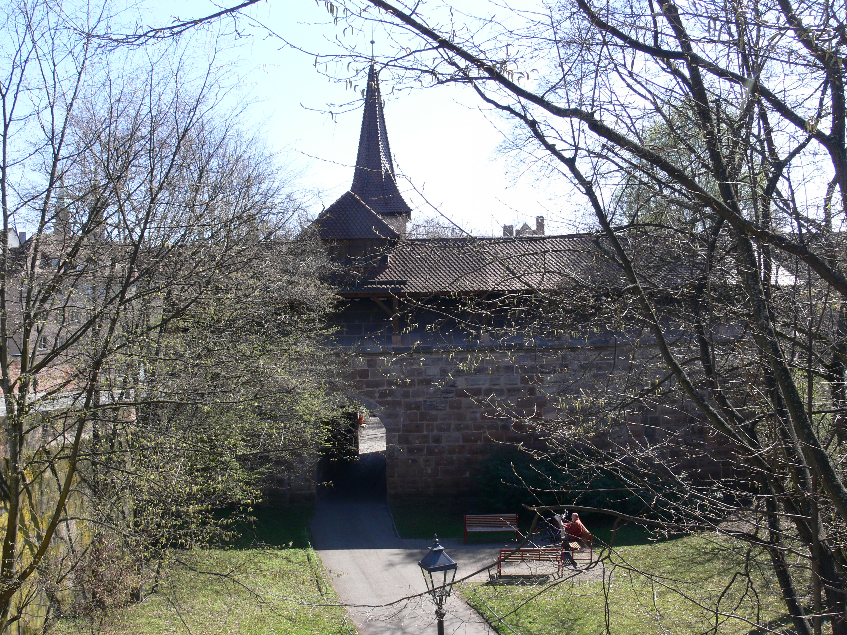 Nürnberg, Bastion und Hallertürlein (Turm Grünes G), Feldseite